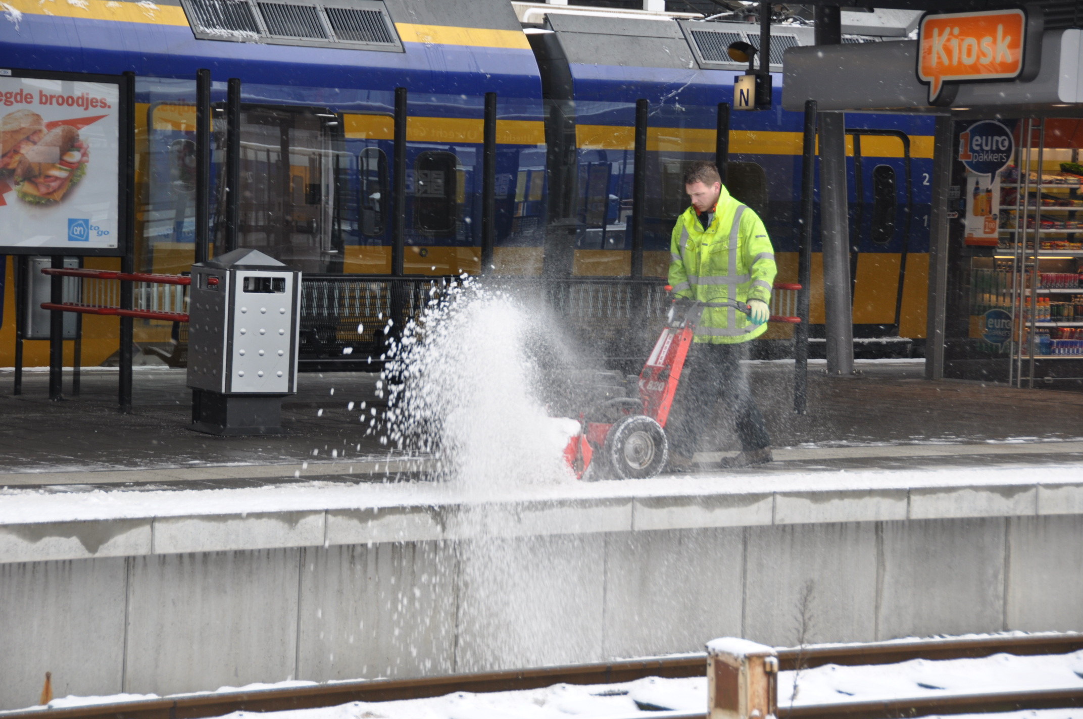 Sneeuwschuiver Utrecht Centraal. Uit het dossier seizoenen, over de invloed van het weer op de dienstregeling van de Nederlandse Spoorwegen.